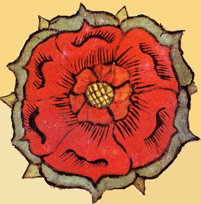 Rose héraldique de Rosheim extraite de la page de titre du Registre des Délibérations du Magistrat de Rosheim (1626)